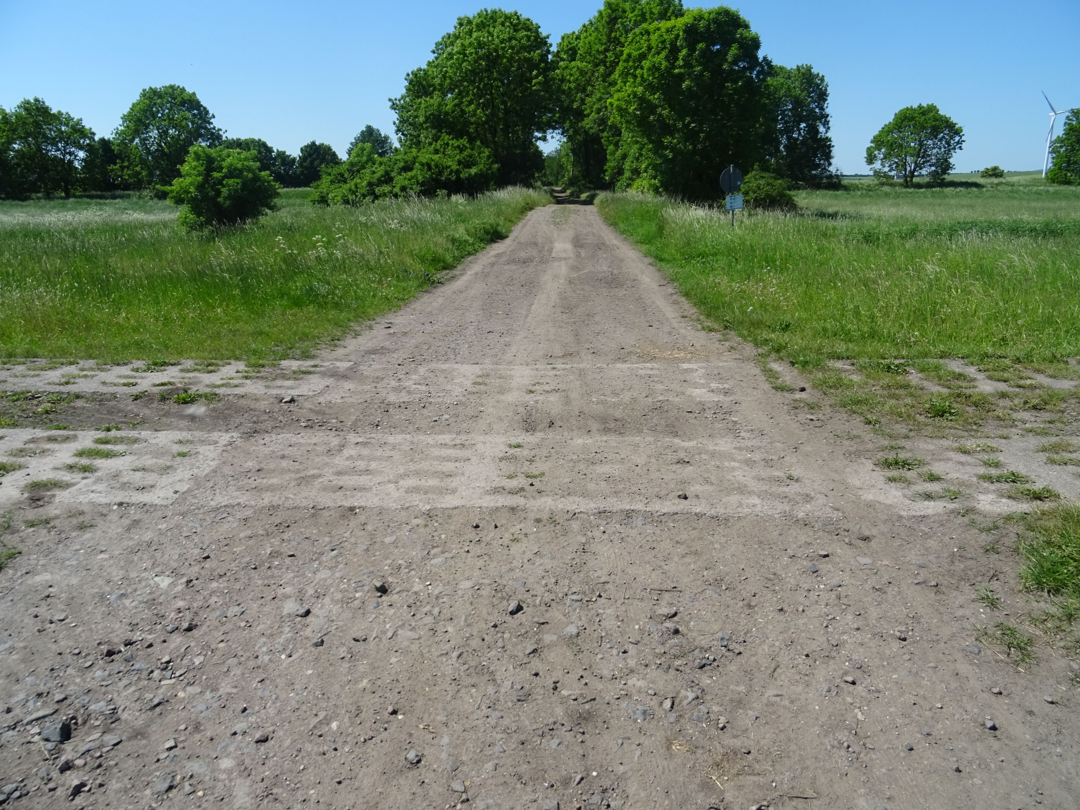 Trasse der Bahnstrecke Oschersleben-Wolfenbüttel an der früheren Grenze DDR/Bundesrepublik zwischen Gunsleben und Jerxheim. Von links nach rechts kreuzt ein Postenweg